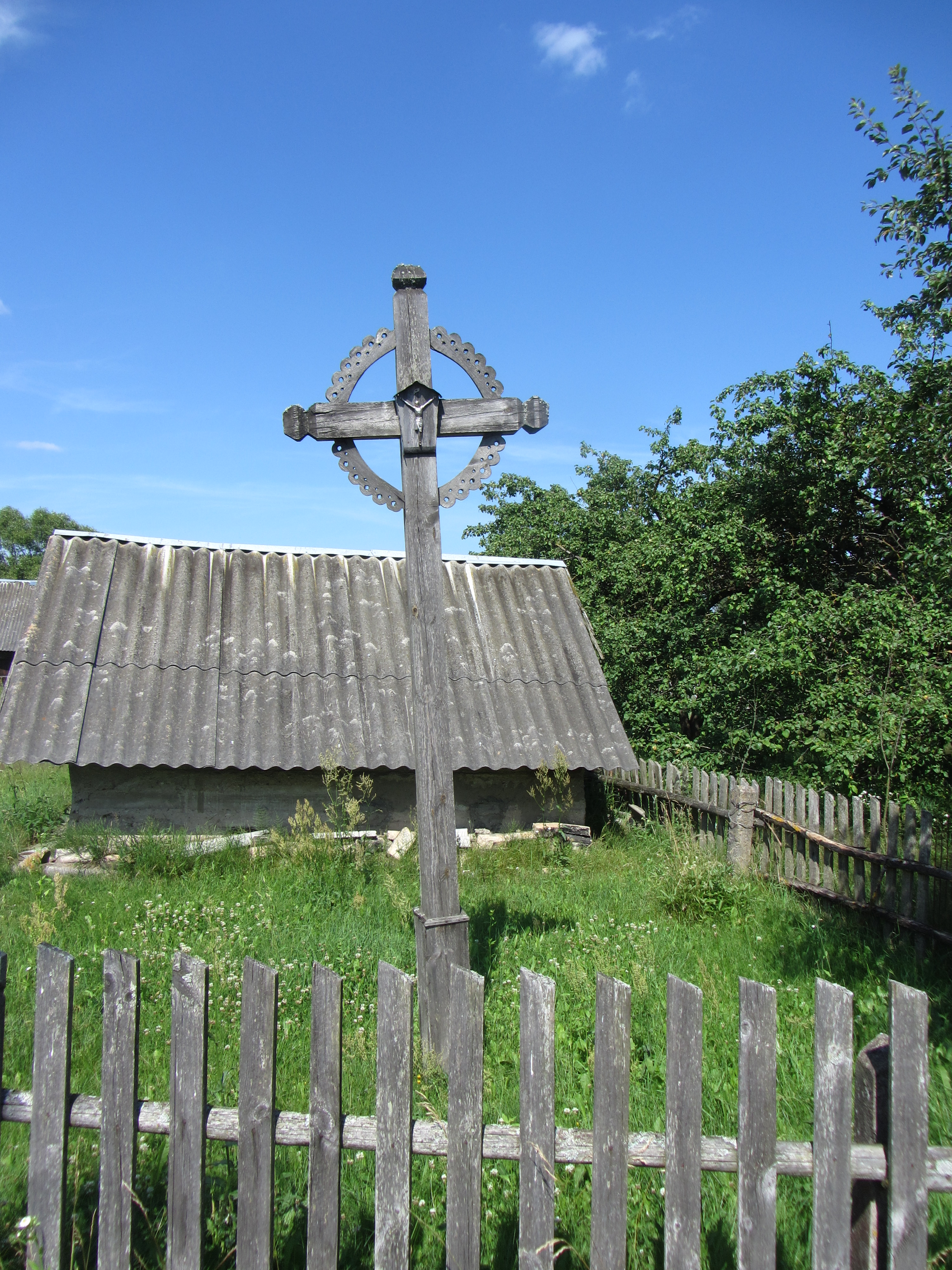 Dubičiai, Lithuania